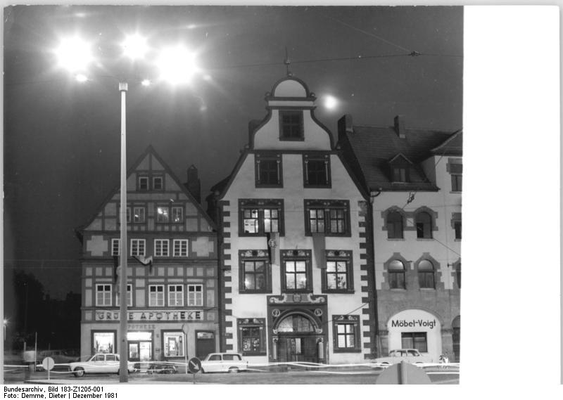 ADN-ZB-Demme-5.12.1981-Erfurt: Schöne DDR- Das "Haus zur hohen Lilie" (Mitte) zählt zu den bemerkenswertesten historischen Bauten am Erfurter Domplatz. Das Bauwerk der Frührenaisannce, 1538 unter Einbeziehung gotischer Bauteile errichtet, war und ist eine Gaststätte. Schon Luther soll dort eingekehrt sein."